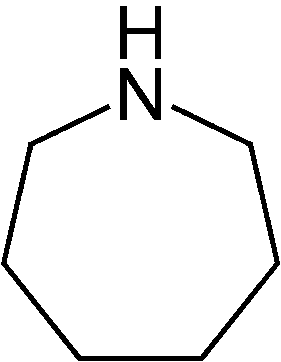 Struktur von Azepan